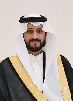 Haməd bin Abdullah bin Səud bin Xudeyr